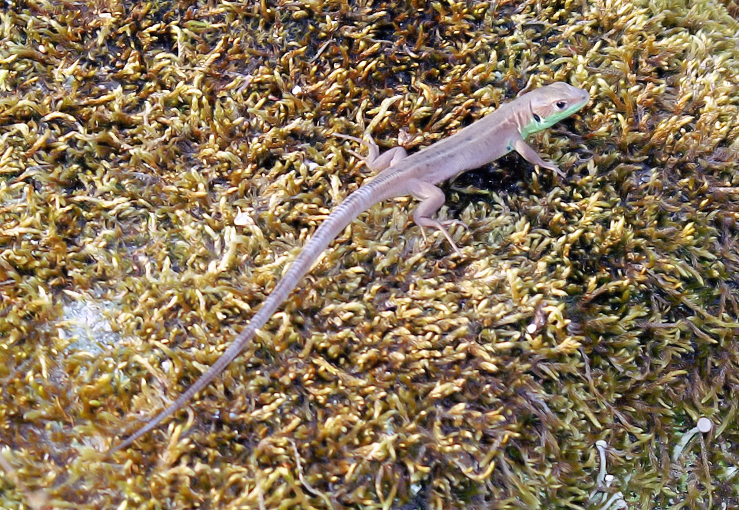 Lacerta bilineata juvenile